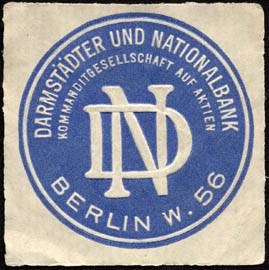 Sealing stamp Title: Darmstädter und Nationalbank - Kommanditgesellschaft auf Aktien Description: Briefsiegel, blau, weiß, geprägt Place: Darmstadt size: 4 cm